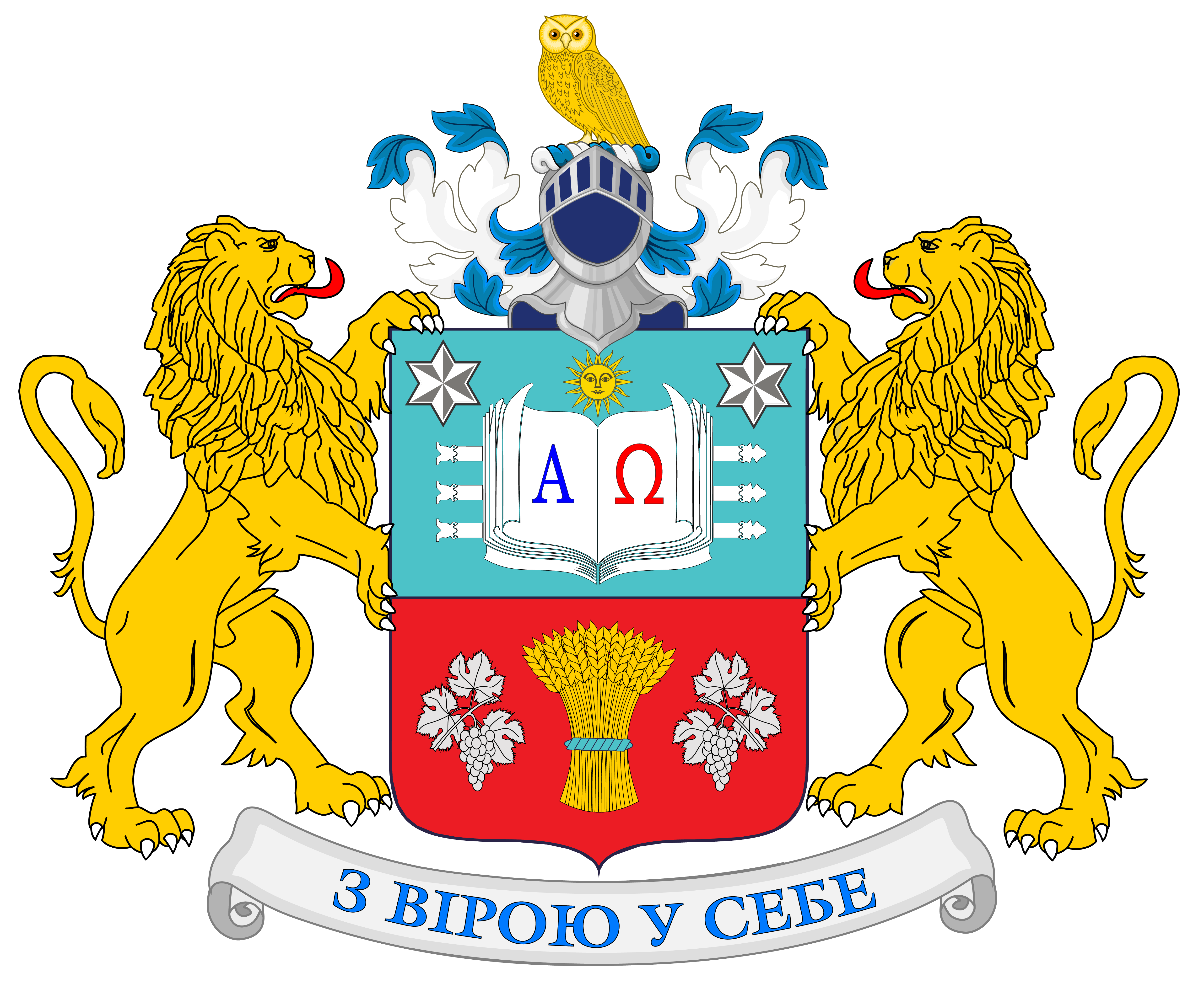 Родовий герб Лісових, зареєстрований в Українському Геральдичному Товаристві під №721.